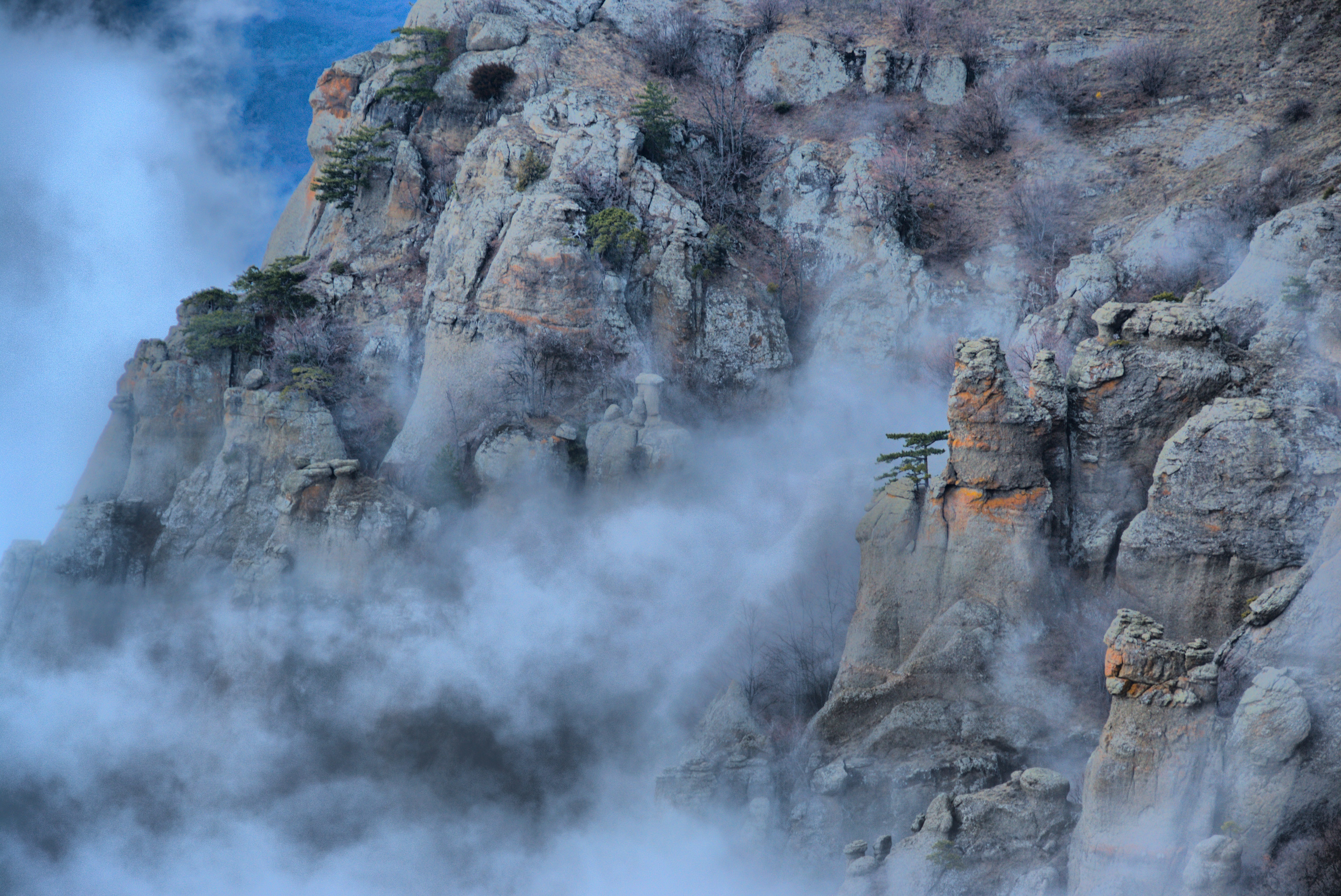 Урочище Демерджи: 2 км севернее села. Алуштинское лесничество, кв. 38, Лучистое, Алушта, Крым This object is located on the Crimean Peninsula and recognized as a protected area by both Russia and Ukraine under the ID: 8210044 / 01-103-5010, respectively. The legal status of the Crimean region is currently disputed.